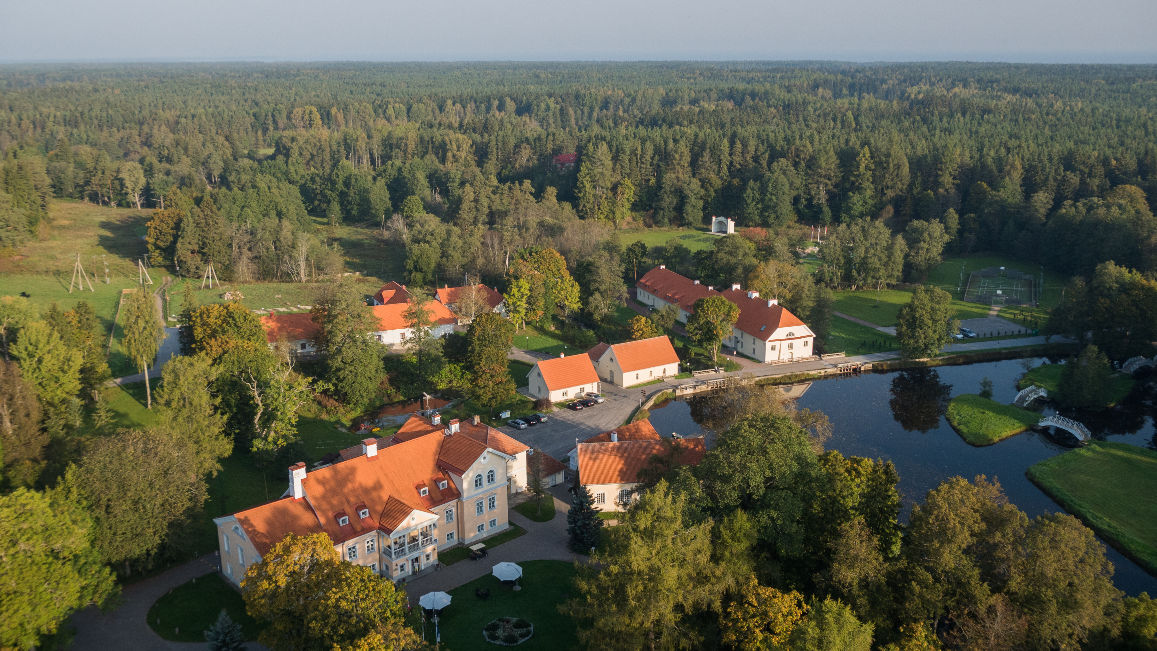 Tagaplaanil paistab ka osaliselt mõisakompleks